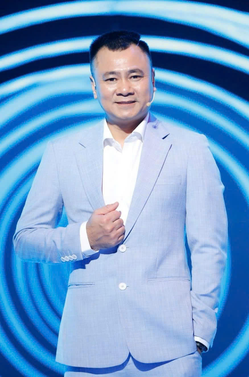 Hình ảnh diễn viên Tự Long